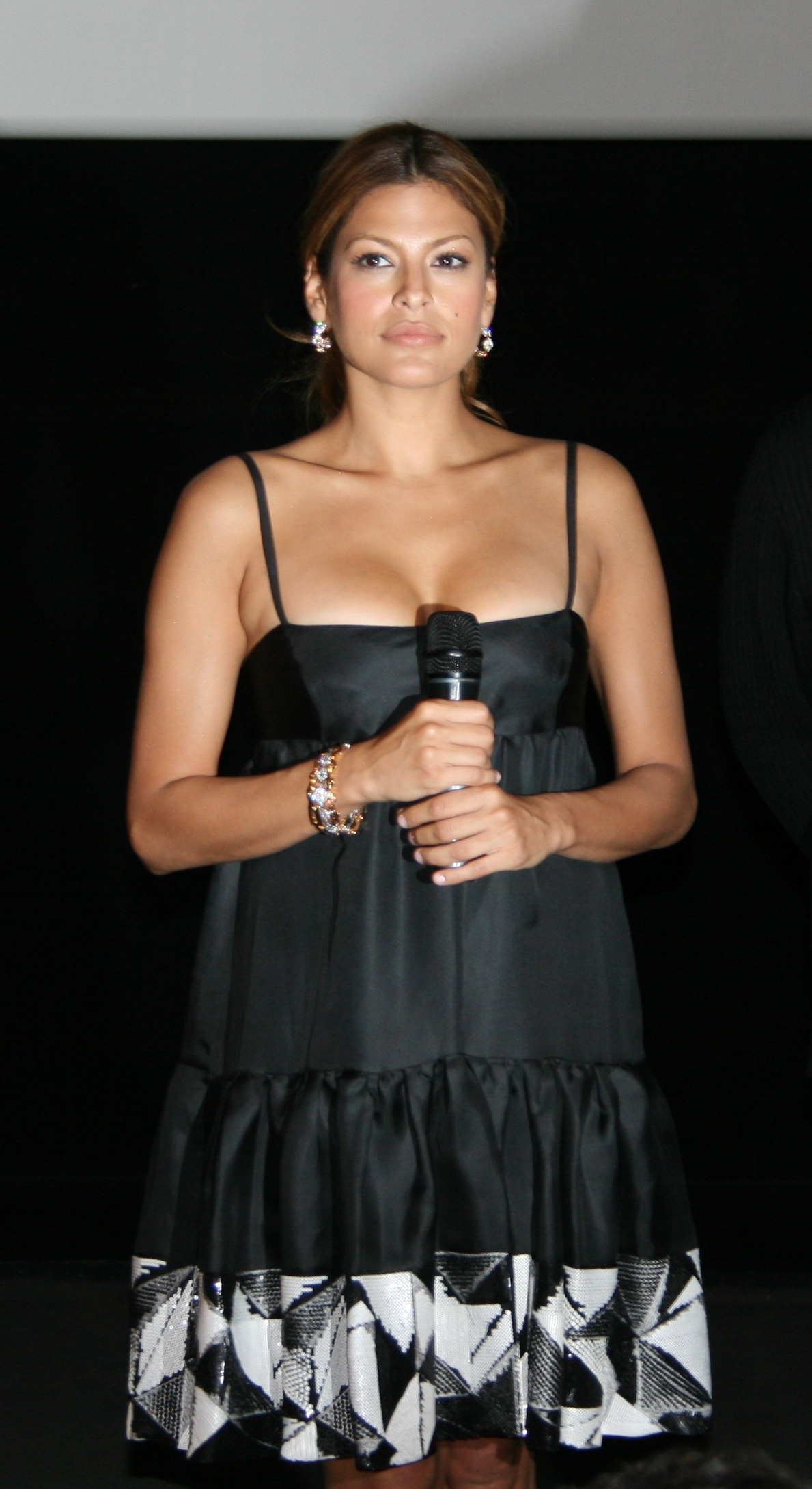 Eva Mendes à l'avant-première de Live ! diffusée à l'UGC Ciné Cité Les Halles, à Paris.